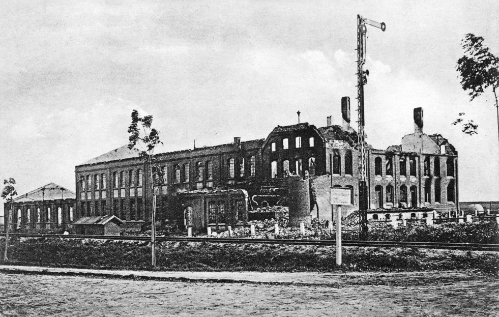 Дружба (Калининградская область)